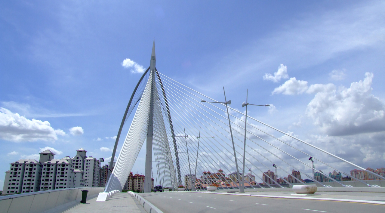 Jambatan Seri Wawasan